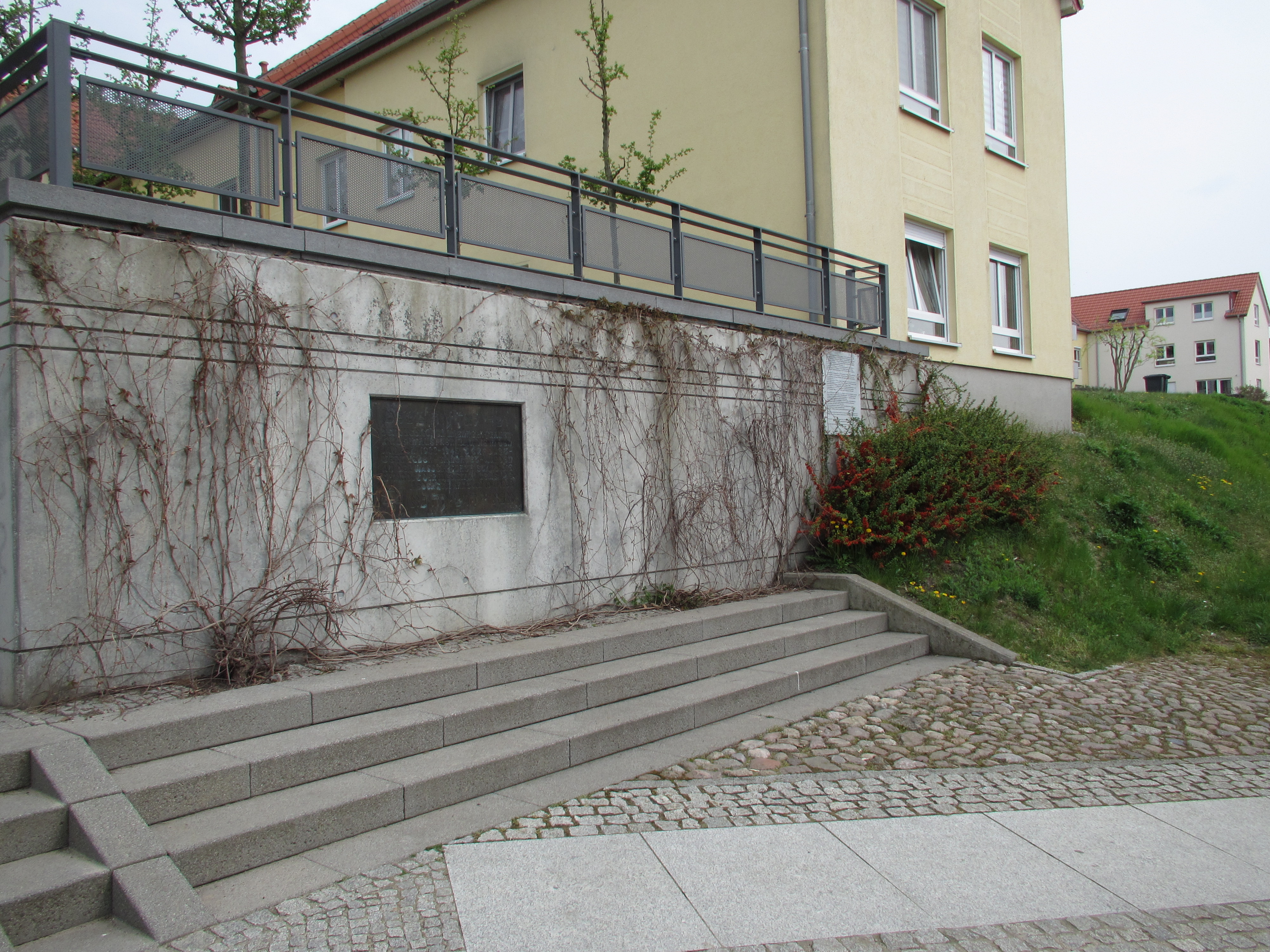 Prenzlau: Den Grundrissen von Synagoge und Rabbinerhaus nachempfundene Terrassenanlage (2004). Abguss der DDR-Gedenktafel von 1988 und mehrsprachige Gedenktafel. ( Quelle: )